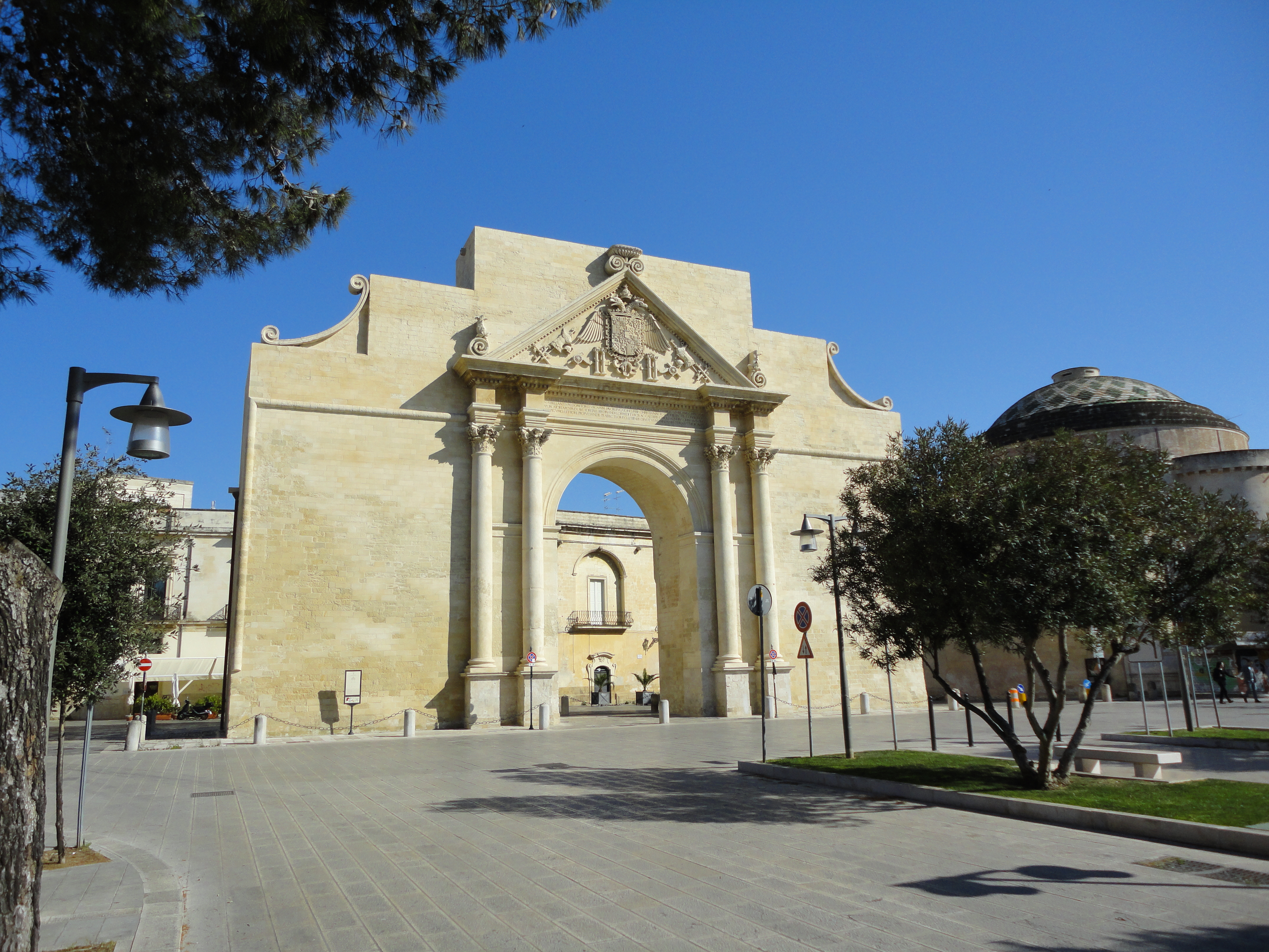 Porta Napoli a Lecce; architect: Gian Giacomo dell'Acaya